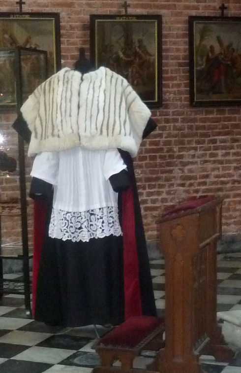 Wintergewaad Sint-Baafskapittel.